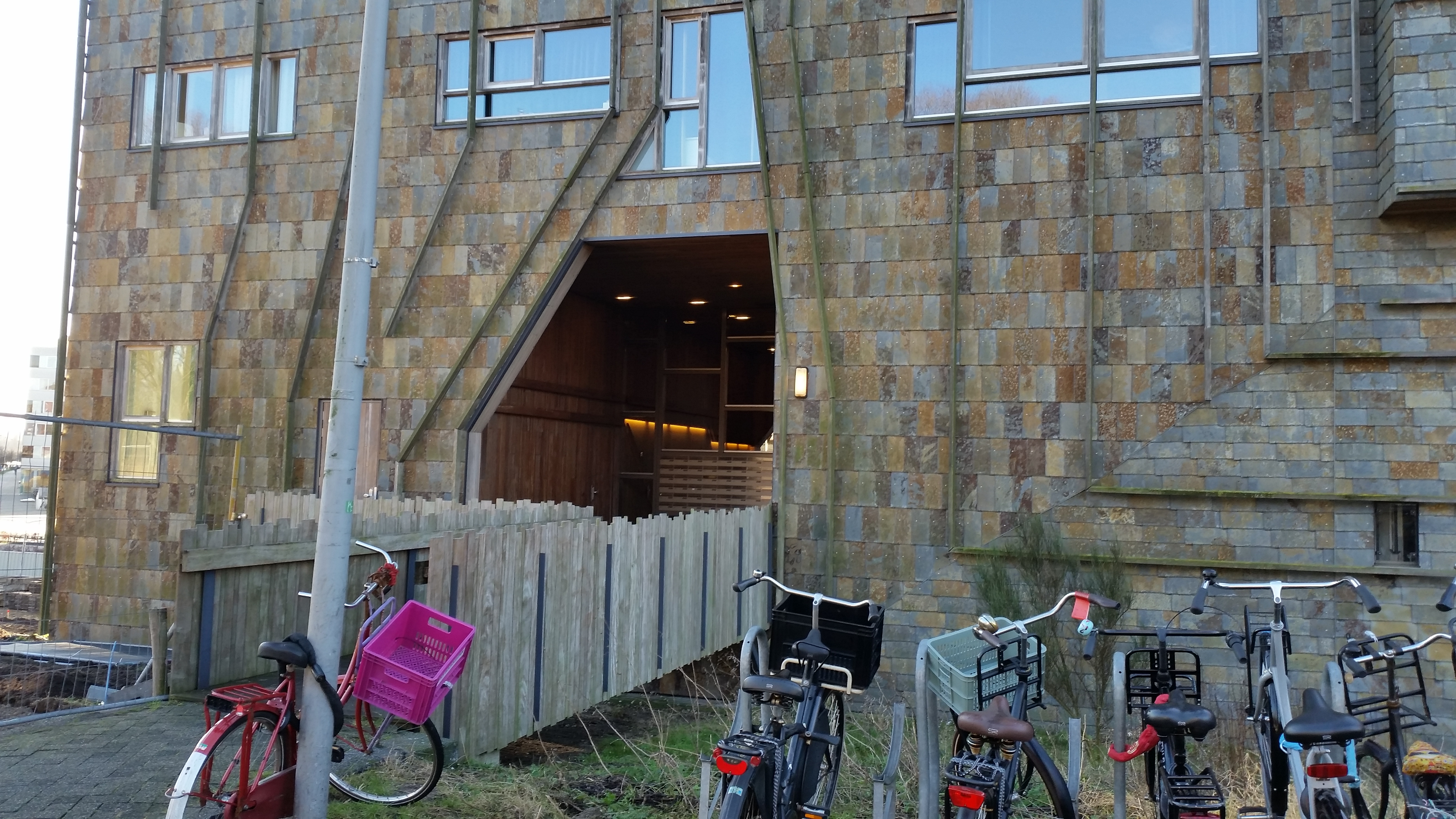 Toegang tot de oosttoren van Samos Building, vanaf het dijklichaam van de ringvaart Watergraafsmeer